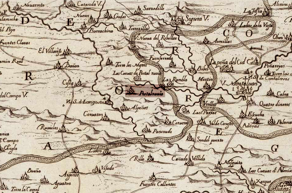 Detalle de la localización de Portalrubio en el mapa de Juan Bautista Labaña, Descripción del Reino de Aragón, [Zaragoza, Diputación del General del Reino de Aragón], 1619. Dedicada a los ilustrísimos señores diputados del Reino de Aragón. Reeditada por Diego de Astor (ca. 1609 - ca. 1650) y (corr. y aum.) Tomás Fermín de Lezaun y Tornos (1747 - 1778), [S.l.], se publicó... por Dn. Thomas Fermin de Lezaun y Tornos, Se empezó a aumentar, corregir é ilustrar, 1777. 6 hojas grabadas, hoja 4ª.